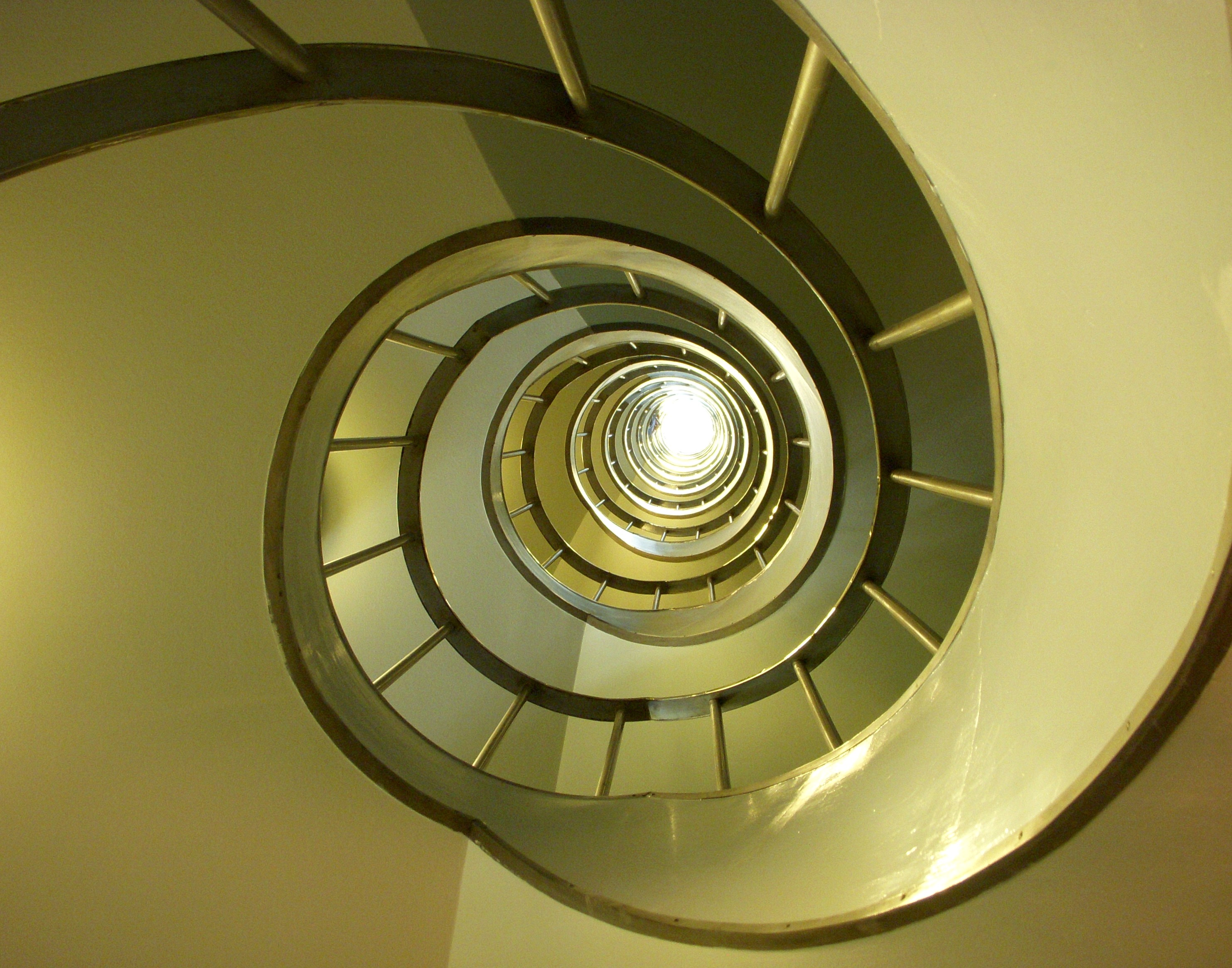 Esselte-husets spiraltrappa i Stockholm